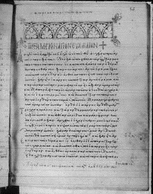 Folio 56 recto, the beginning of the Gospel of Mark